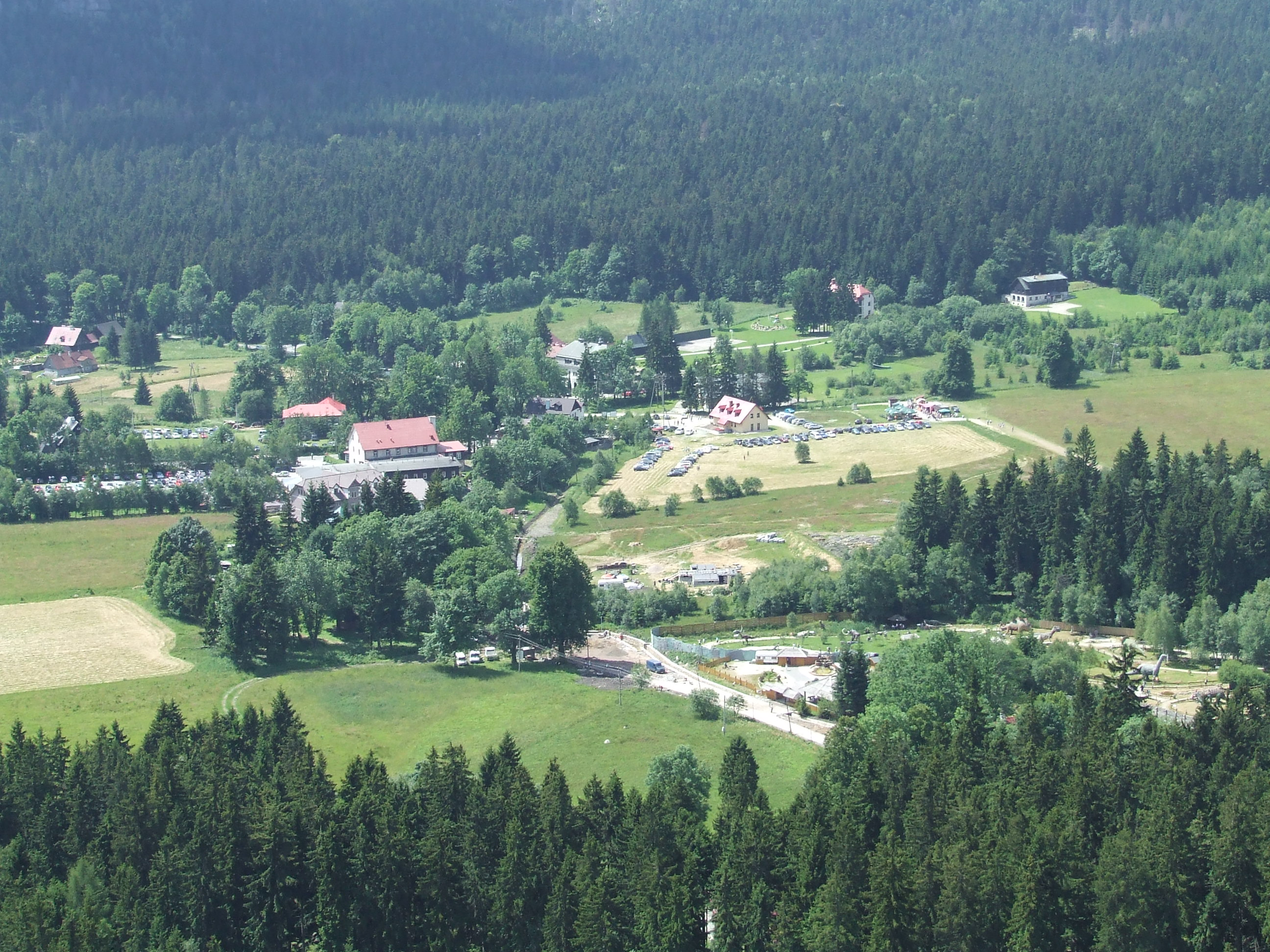 Karlów Totalansicht